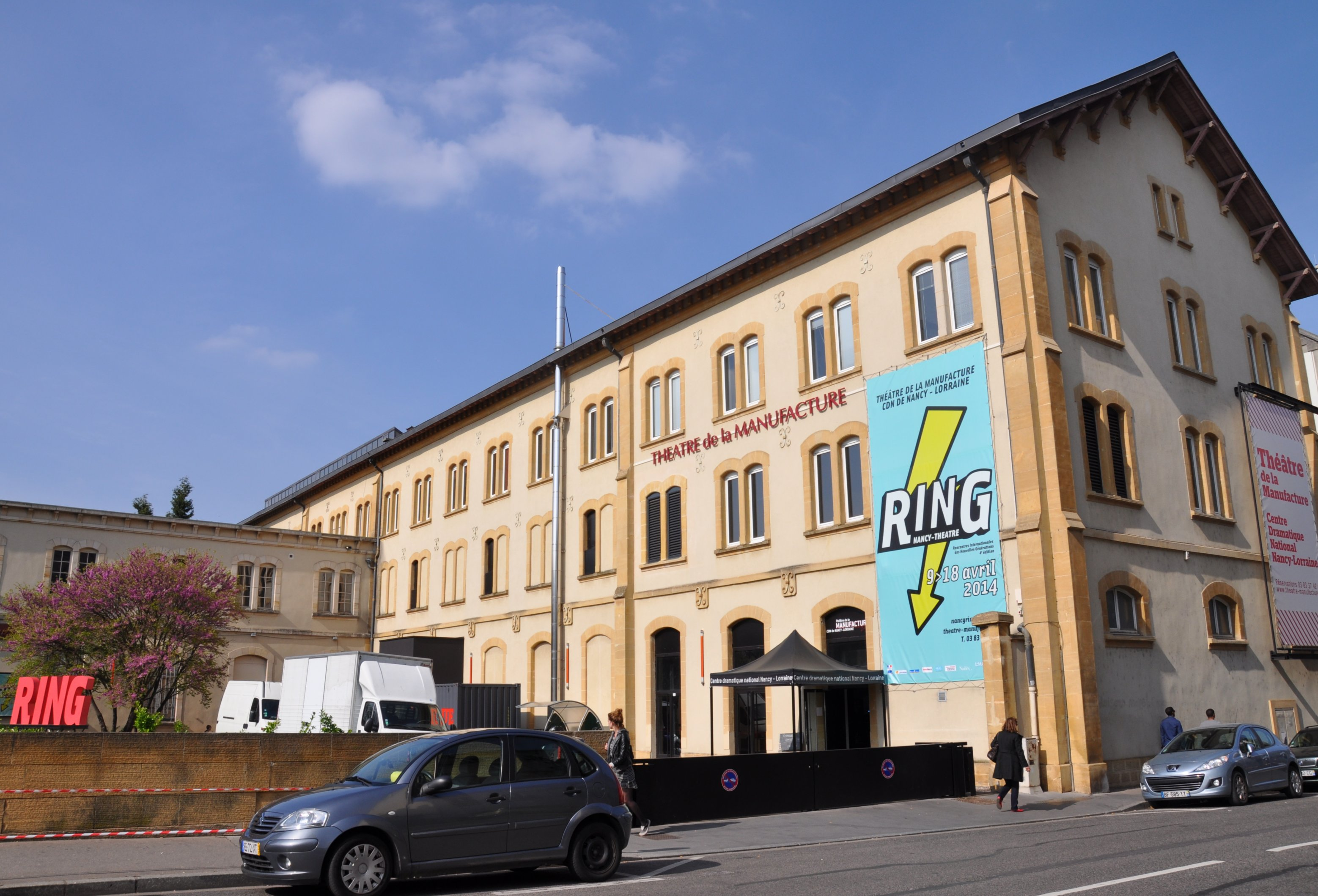 Façade du Théâtre de la Manufacture de Nancy